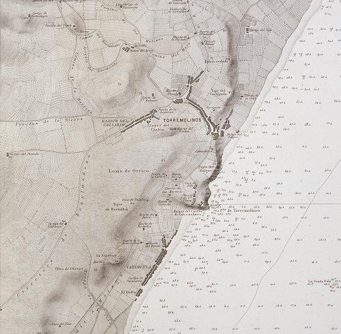 Inserta una vista de la zona desde el mar a 4 millas y a 60 cm de altura Orientado con rosa indicando la desviación magnética. - Sondas. - Relieve por sombreado